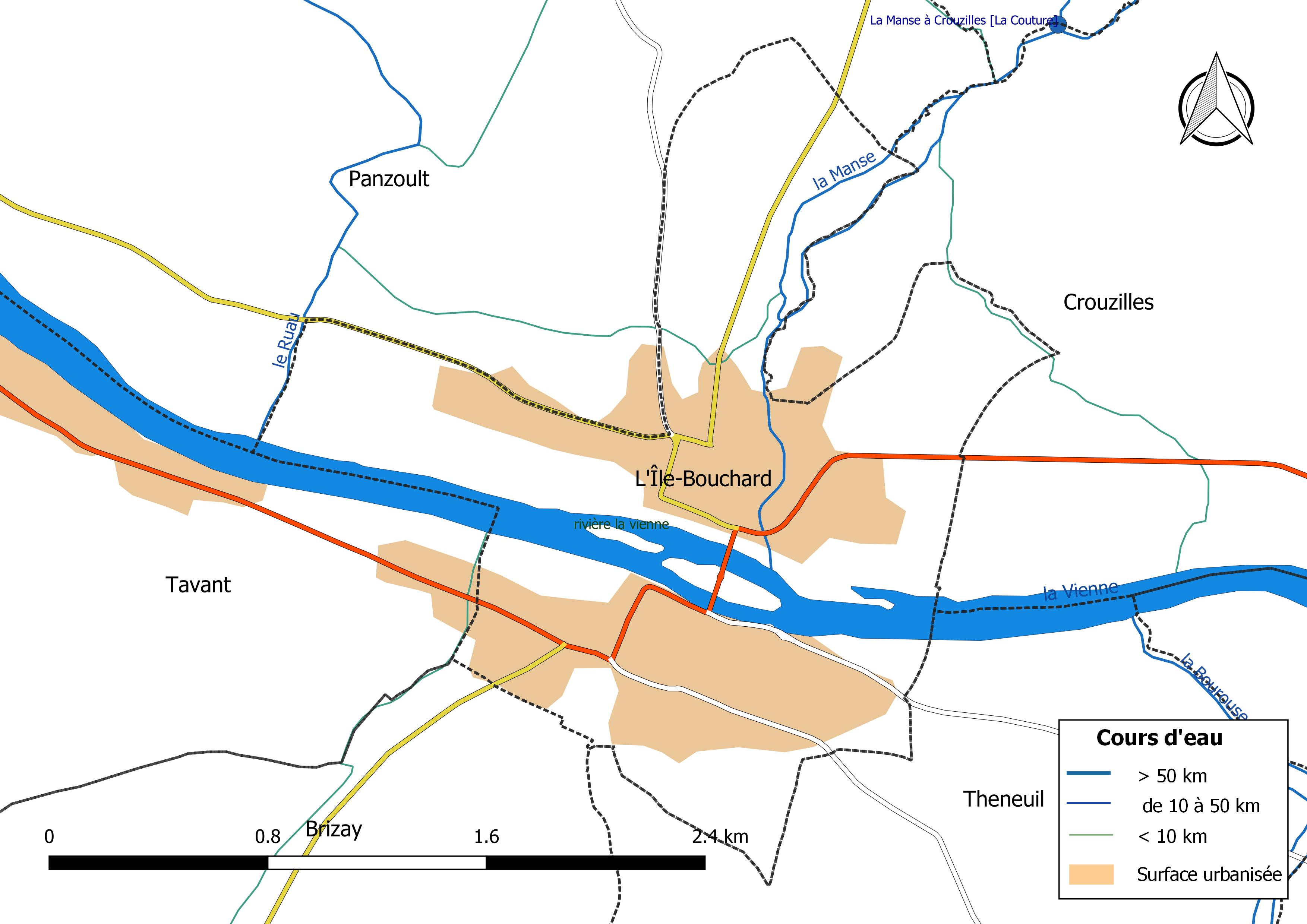 Carte du réseau hydrographique de la commune de L'Île-Bouchard (France).